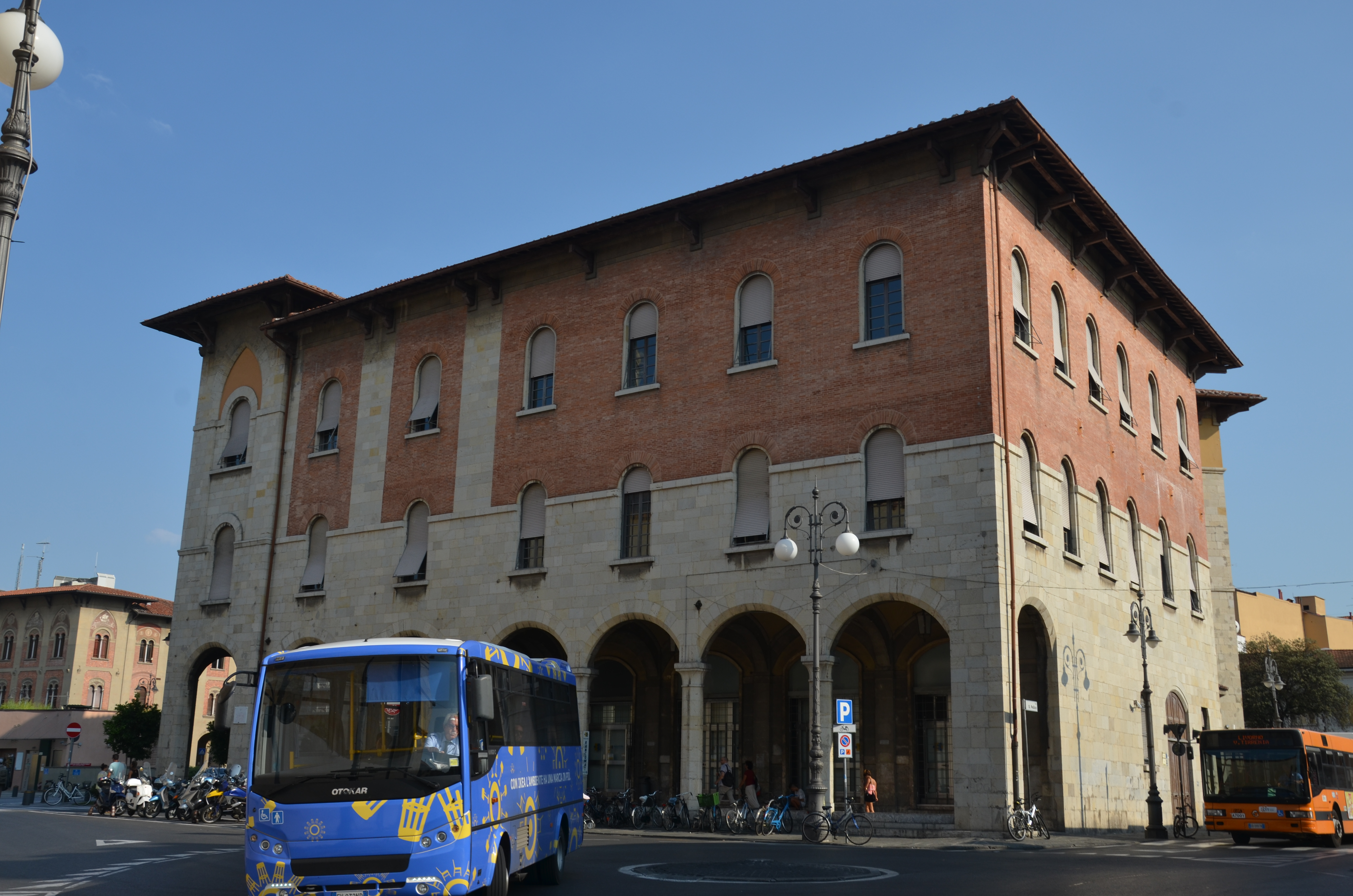 Pisa - 2015